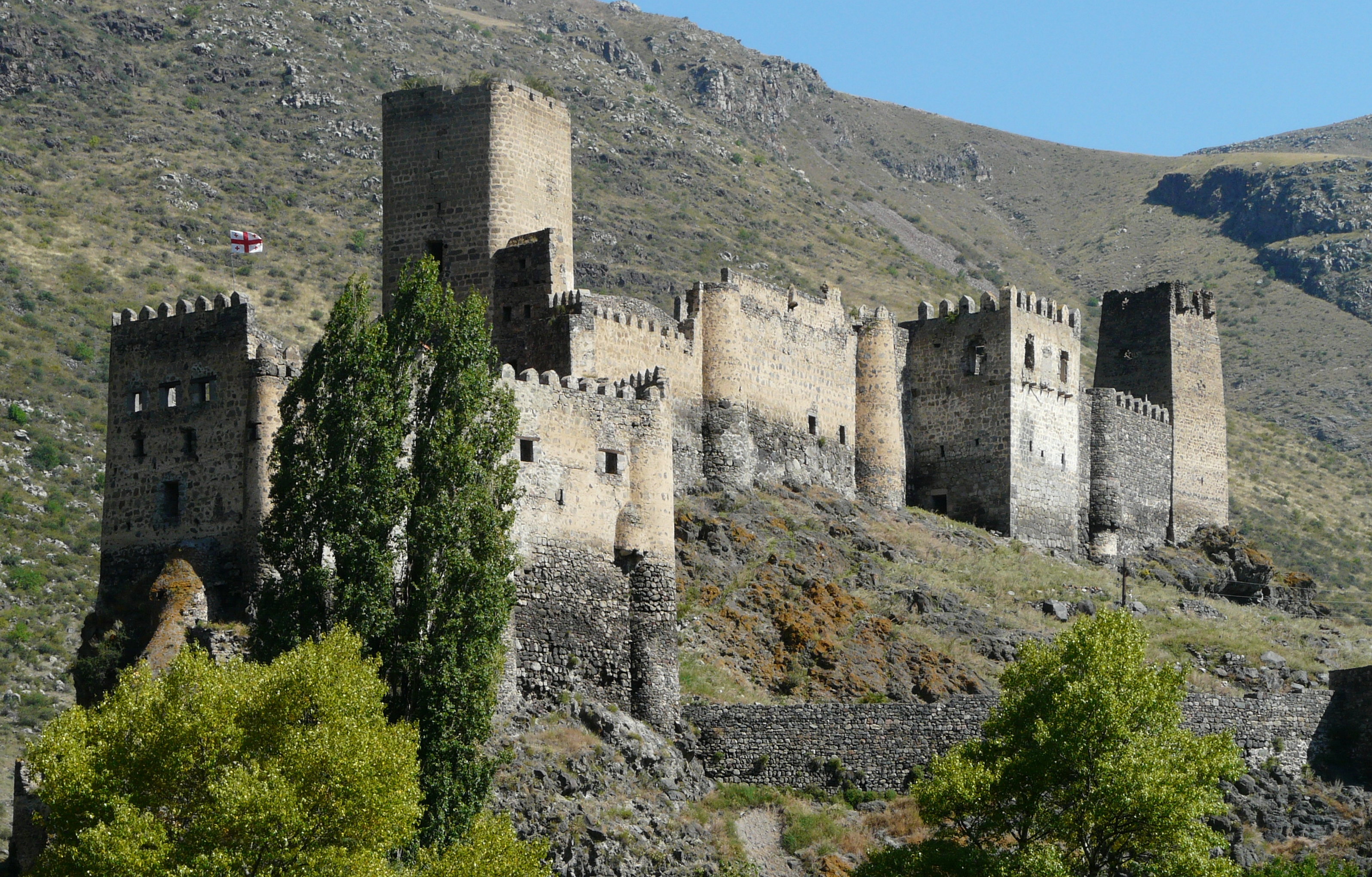 Oberhalb der Kura am Ausgang der Mtkvari-Schlucht gelegen